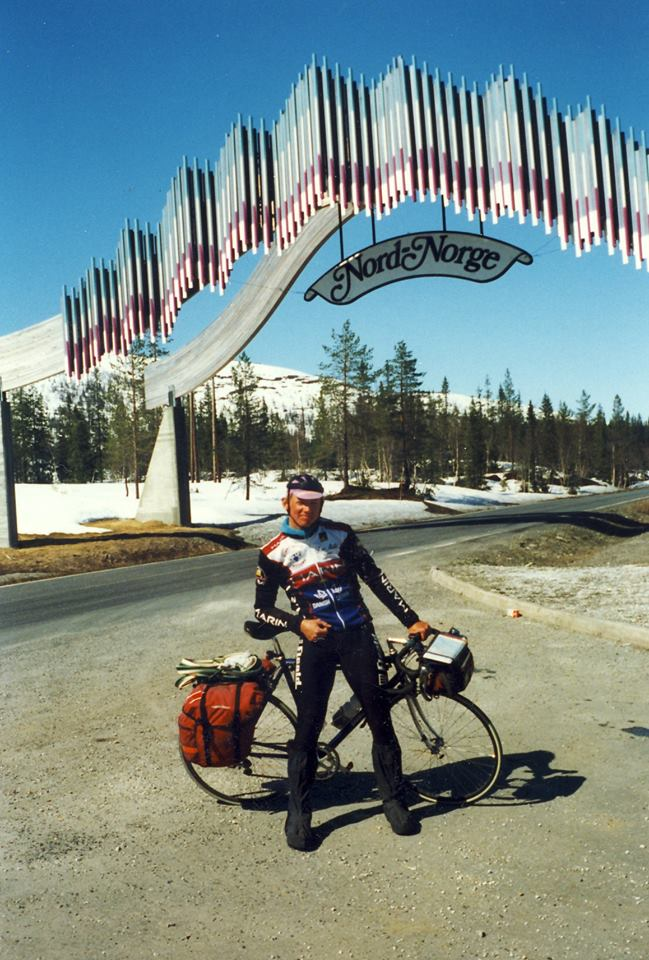 Lars Nielsen cykler til Nordkap og retur 3 (at Majavatn